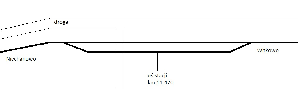 Szkic przystanku osobowego i ładowni Miroszka, 01.01.1958 r.